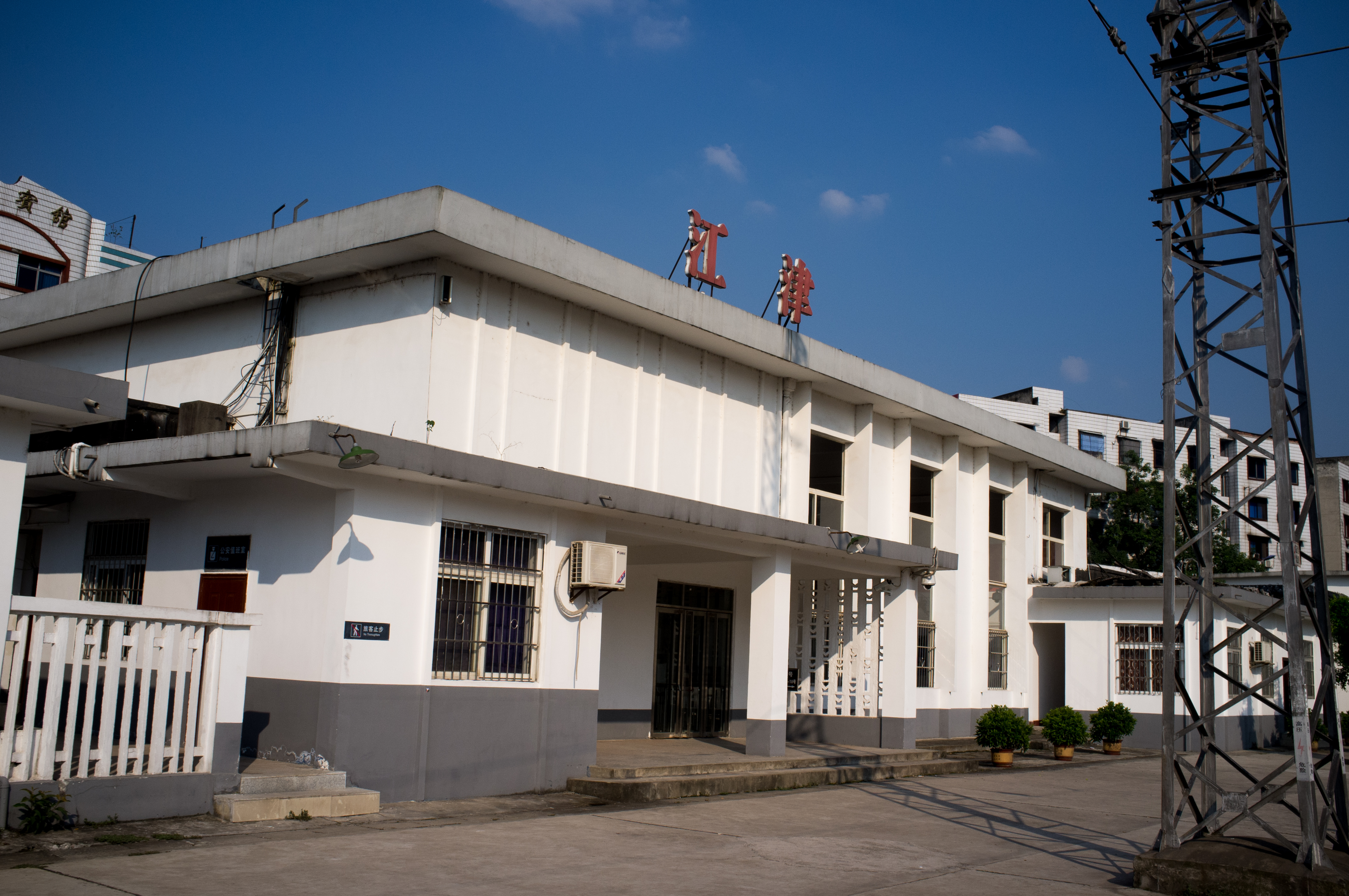 中文（中国大陆）: 成渝铁路江津站